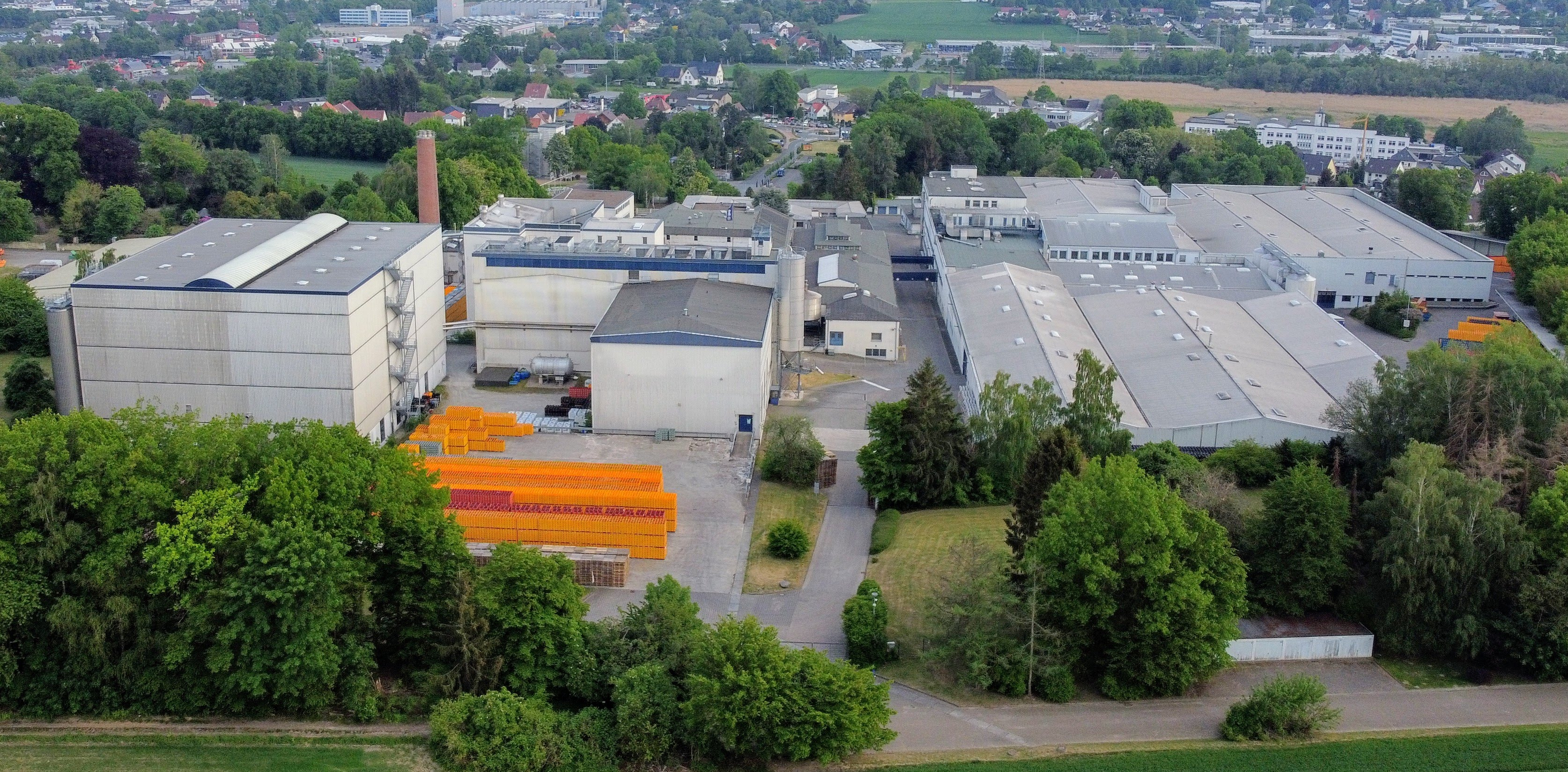 Herforder Brauerei Produktion Luftbild mit Drohne fotografiert